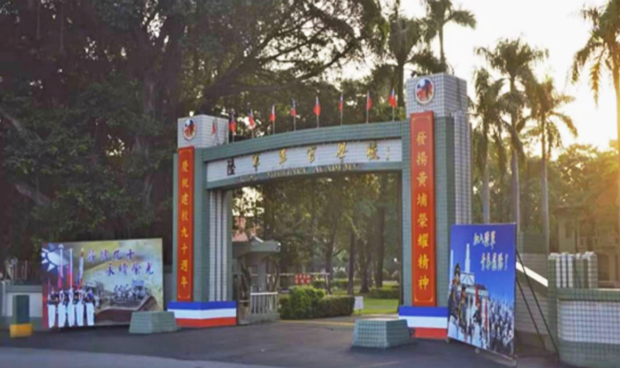 校慶拍照陸官大門